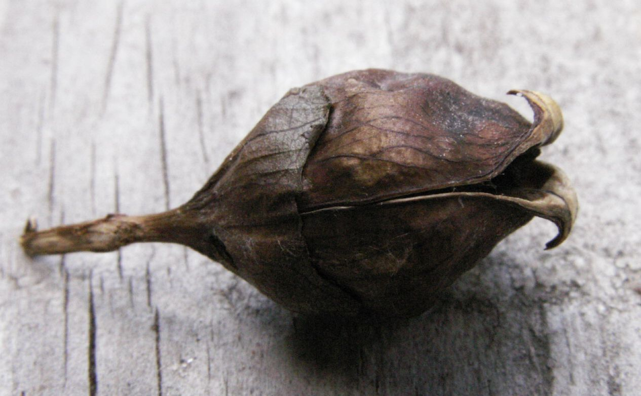 Pedicularis sceptrum-carolinum, Samenkapsel